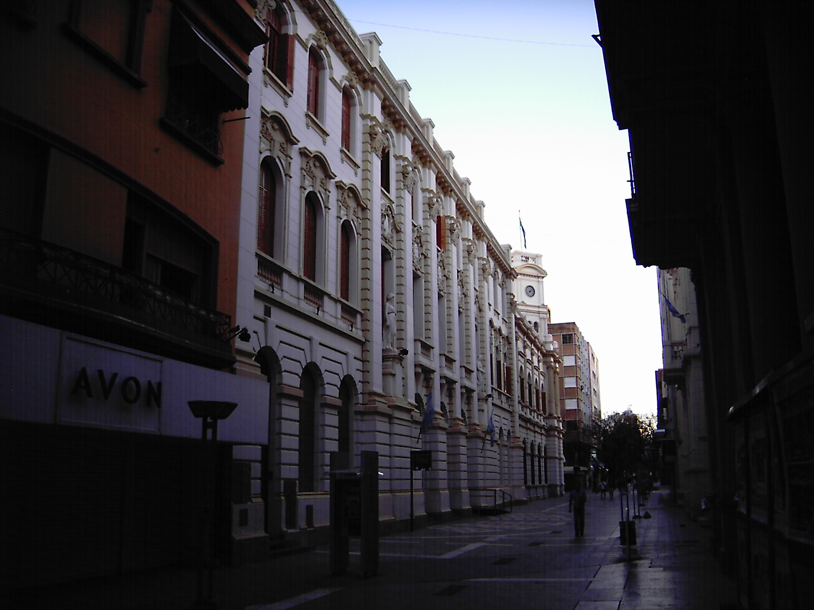 Legislatura Provincial en Córdoba, Argentina